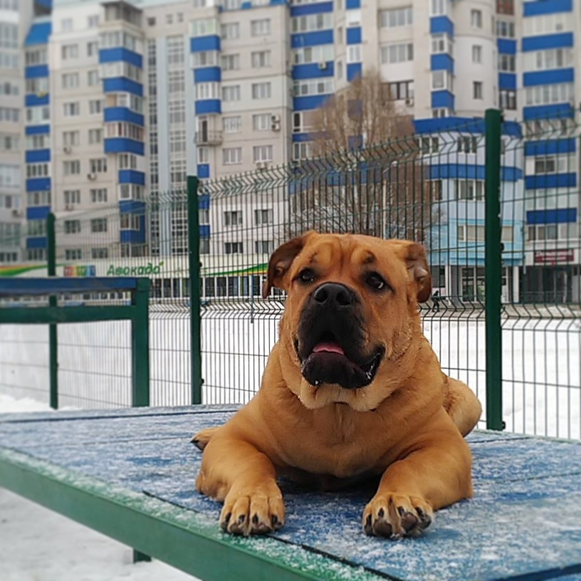 Рыжий Ка де бо, Порода собак Ка де бо